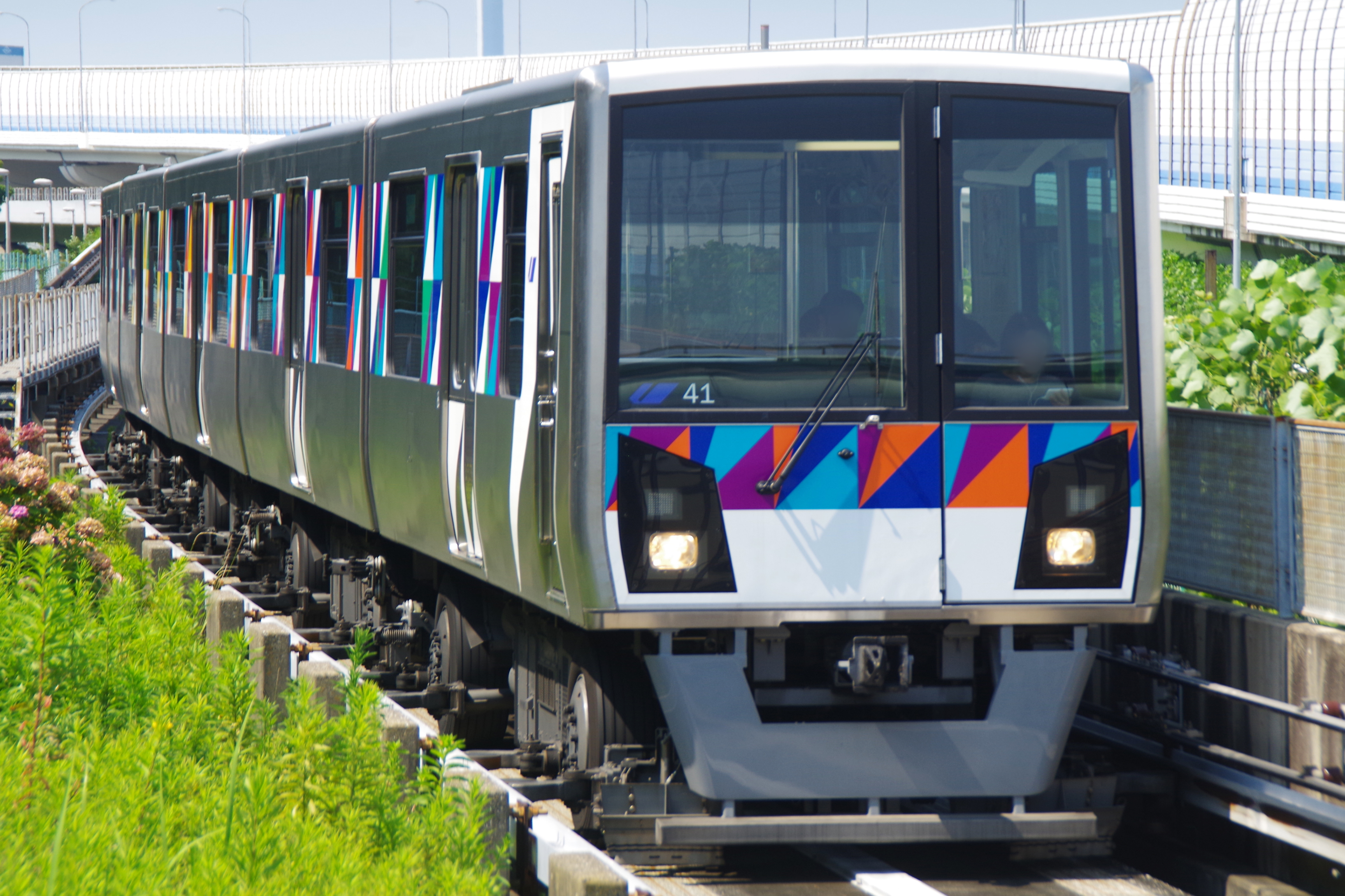 並木北駅に進入する2000形。